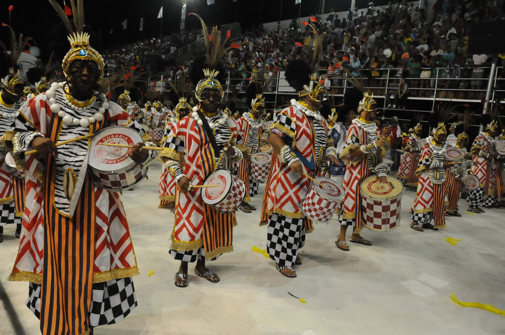 Carnaval 2009 Desfile das escolas de samba de Vitó Carnaval 2009 Desfile das escolas de samba de Vitória - MUG Carnaval 2009 Desfile das escolas de samba de Vitória - MUG. B Carnaval 2009 Desfile das escolas de samba de Vitória - MUG. Veja mais no blog